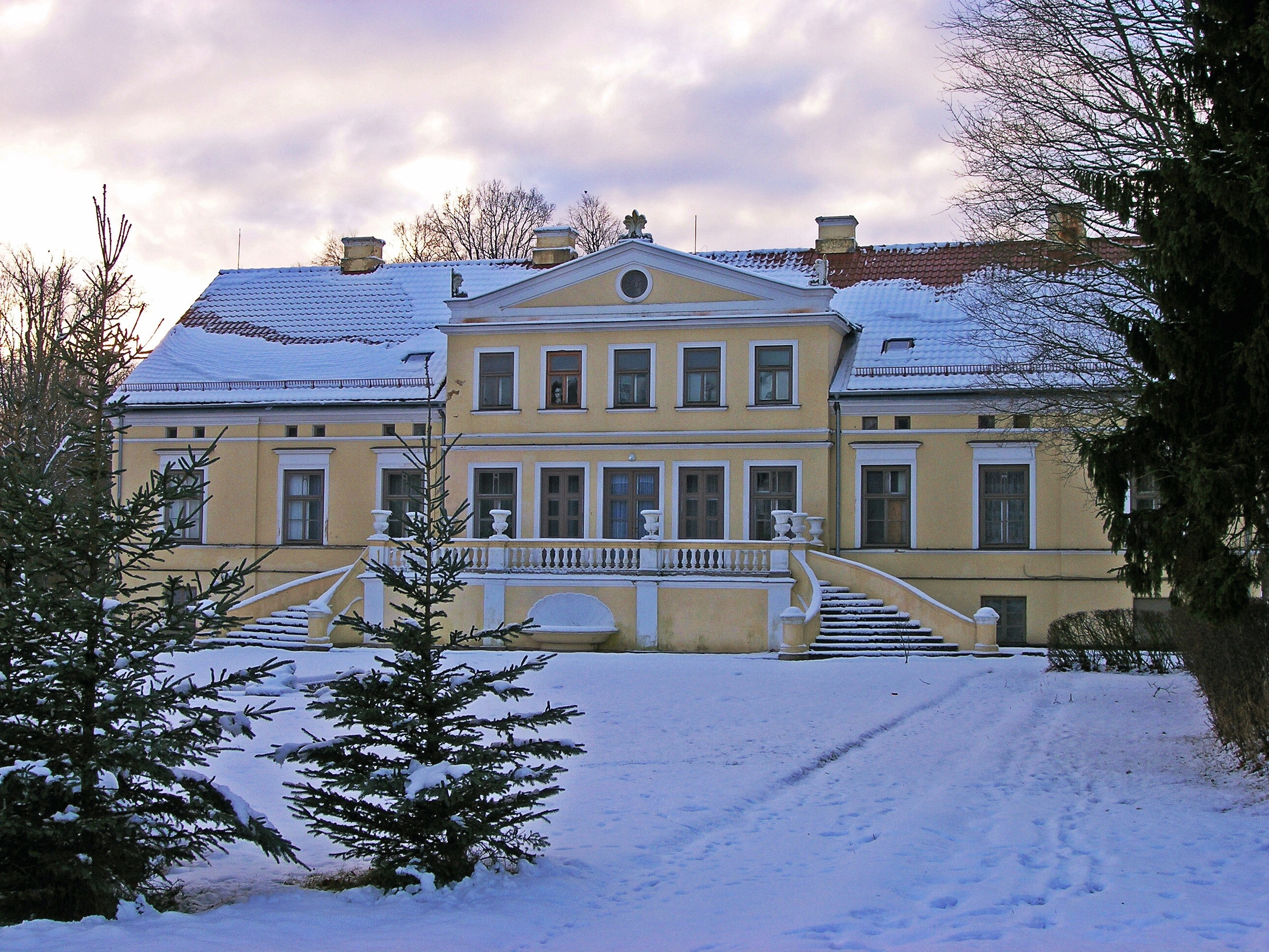 Valdeķu muiža (Valdeki estate)